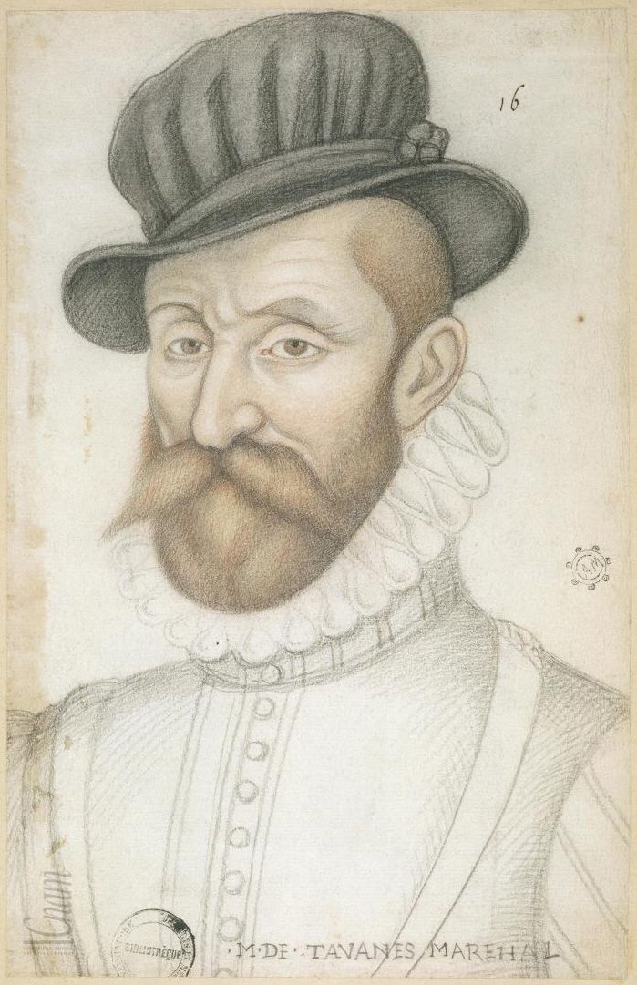 Portraits de Cour. Le "recueil des Arts et Métiers" dessins français de la Renaissance dans le style des Clouet.